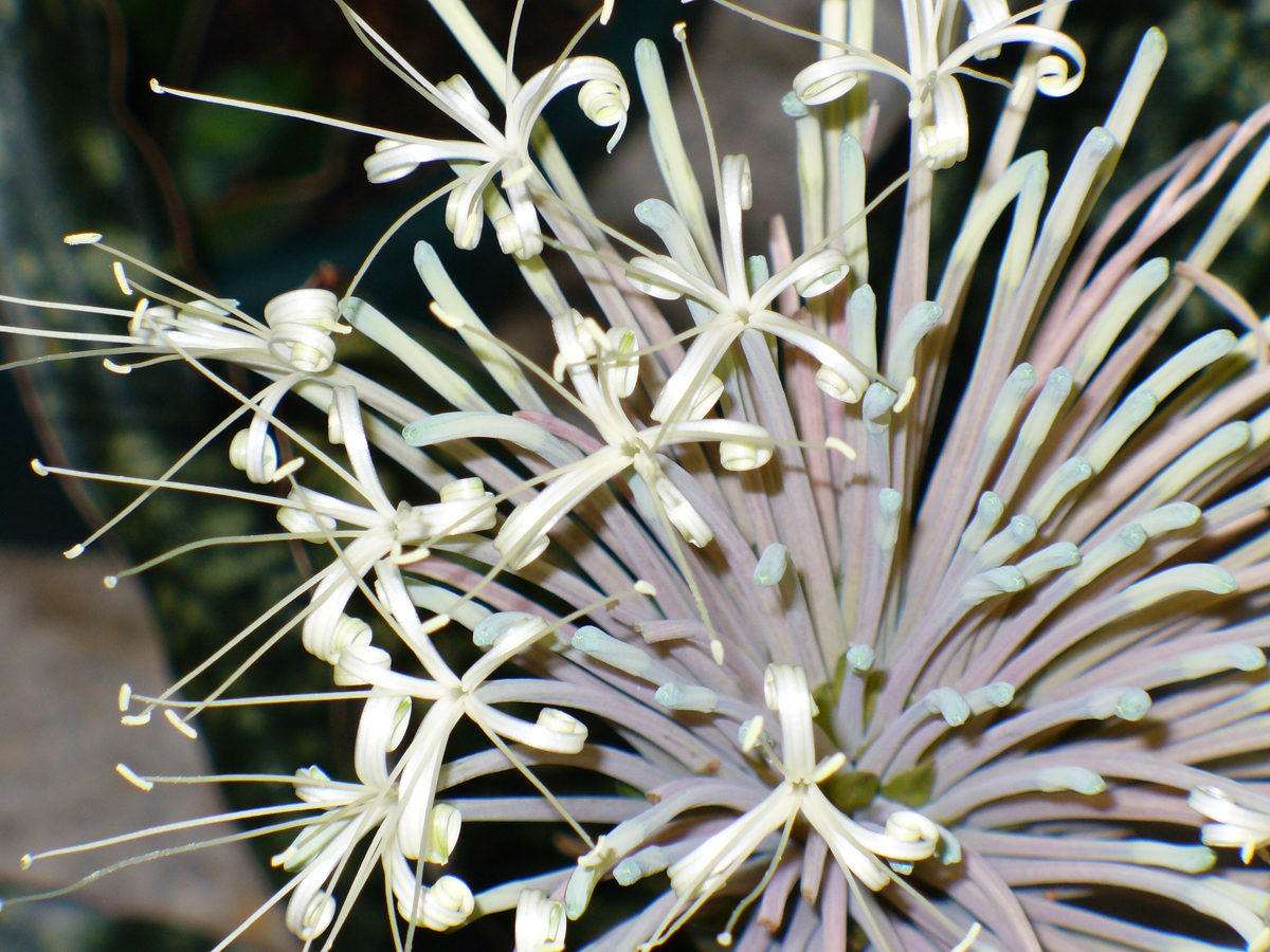 Sansevieria kirkii var. pulchra South Miami, FL, USA. Night-blooming. Flowers smell like vanilla wafers.